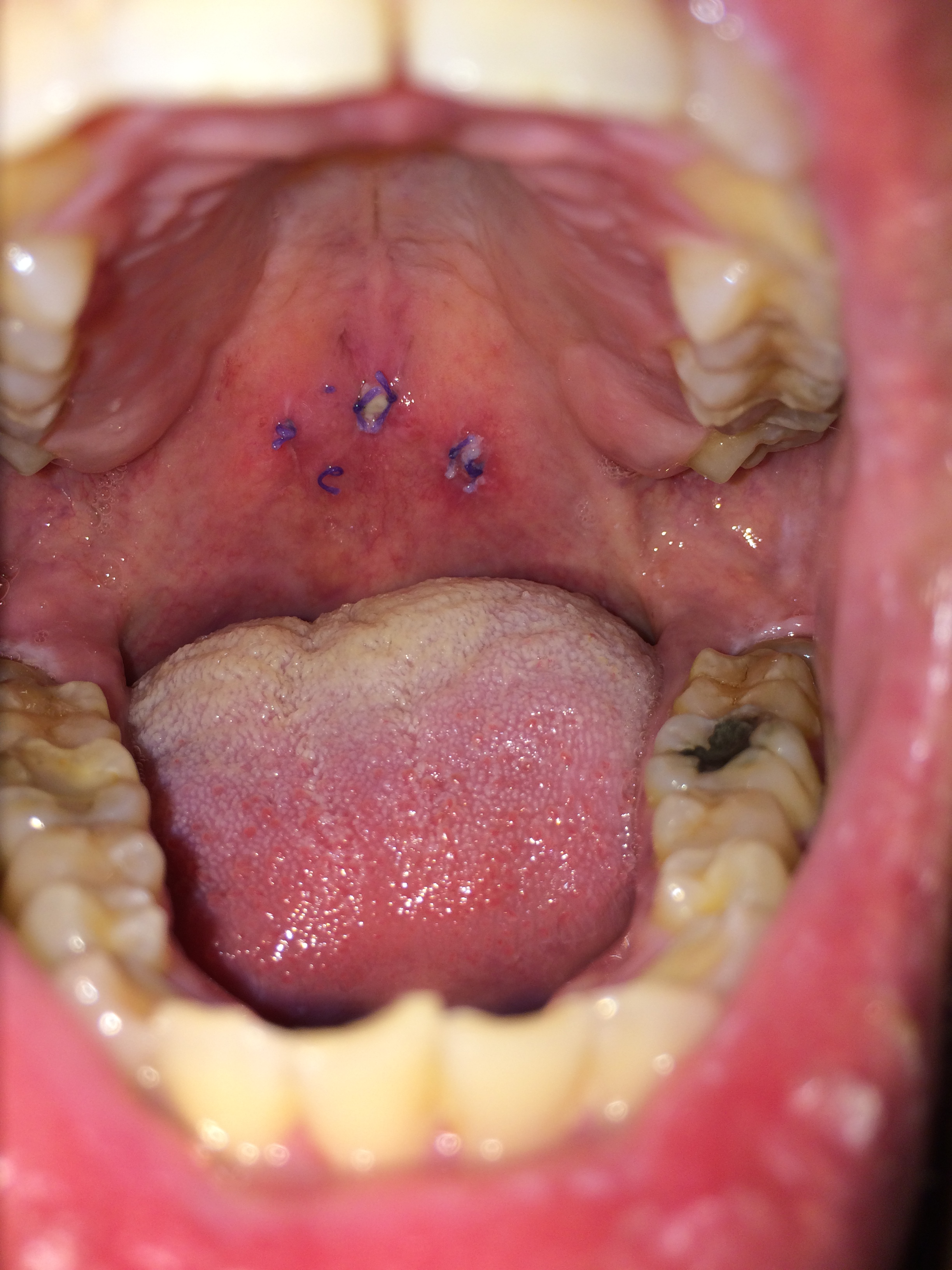 軟顎支架手術